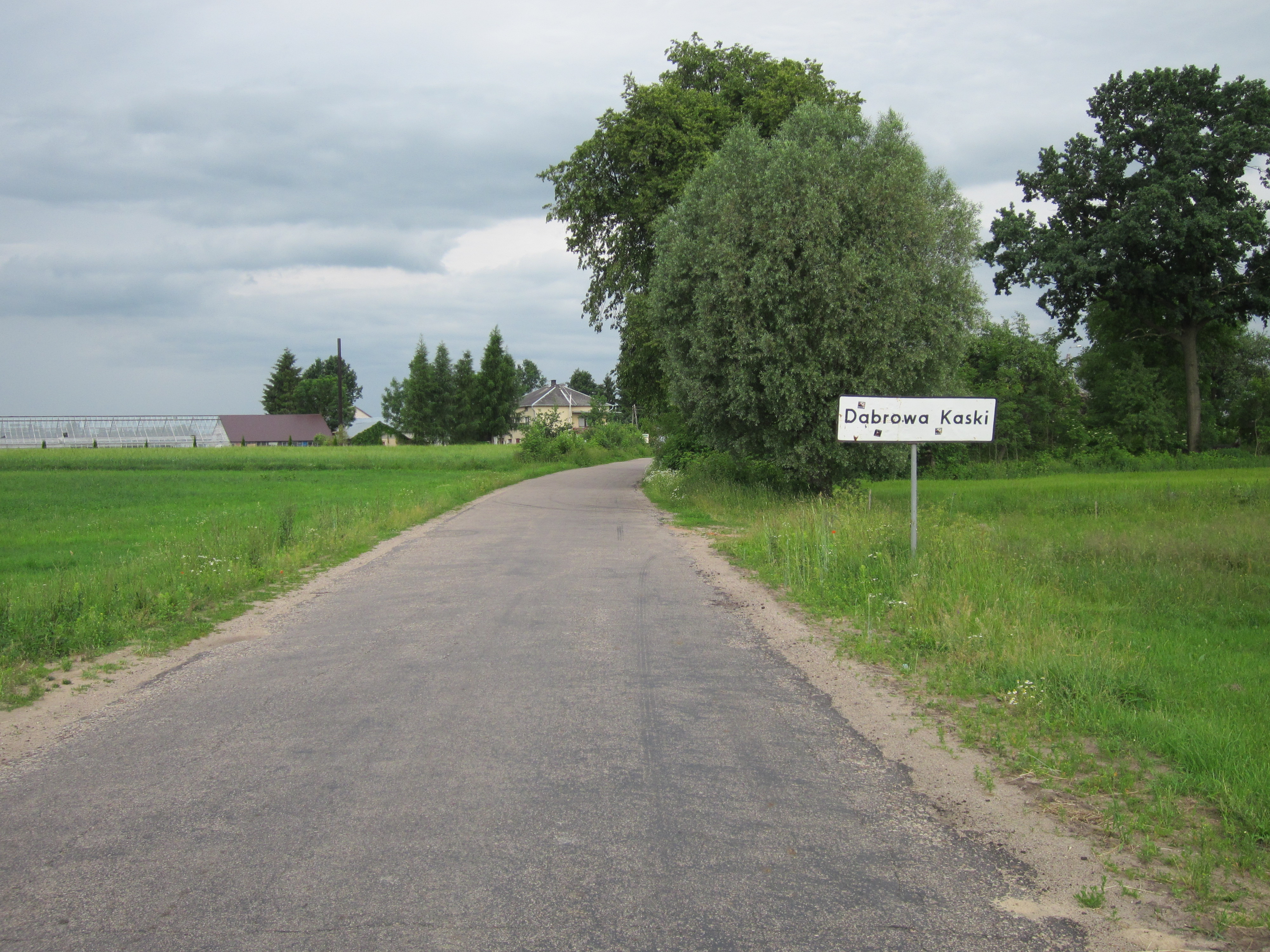 Jest to początek granicy miejscowości od strony Dąbrowy Łazy.